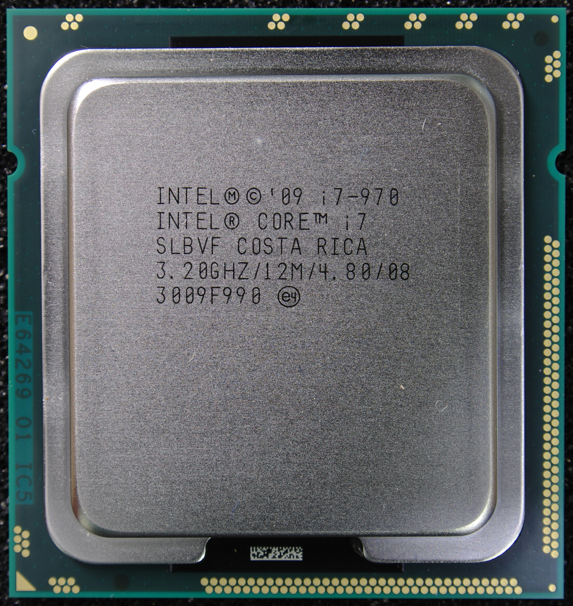 Intel core i7-970 Oberseite